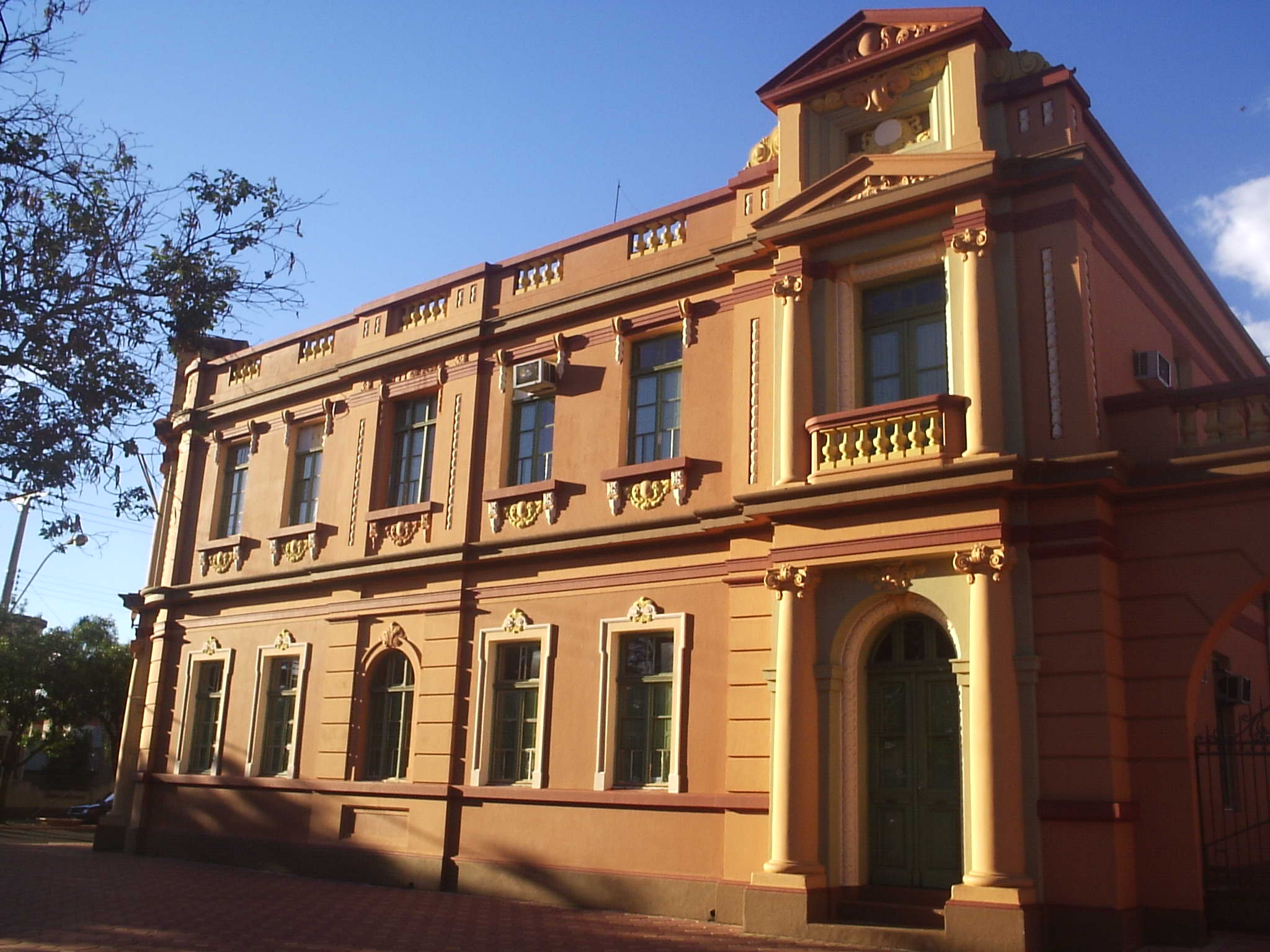 Prefeitura Municipal de Santo Ângelo, Rio Grande do Sul, Brasil